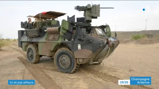 VAB du 3e régiment du génie dans la région de Gao, janvier 2017